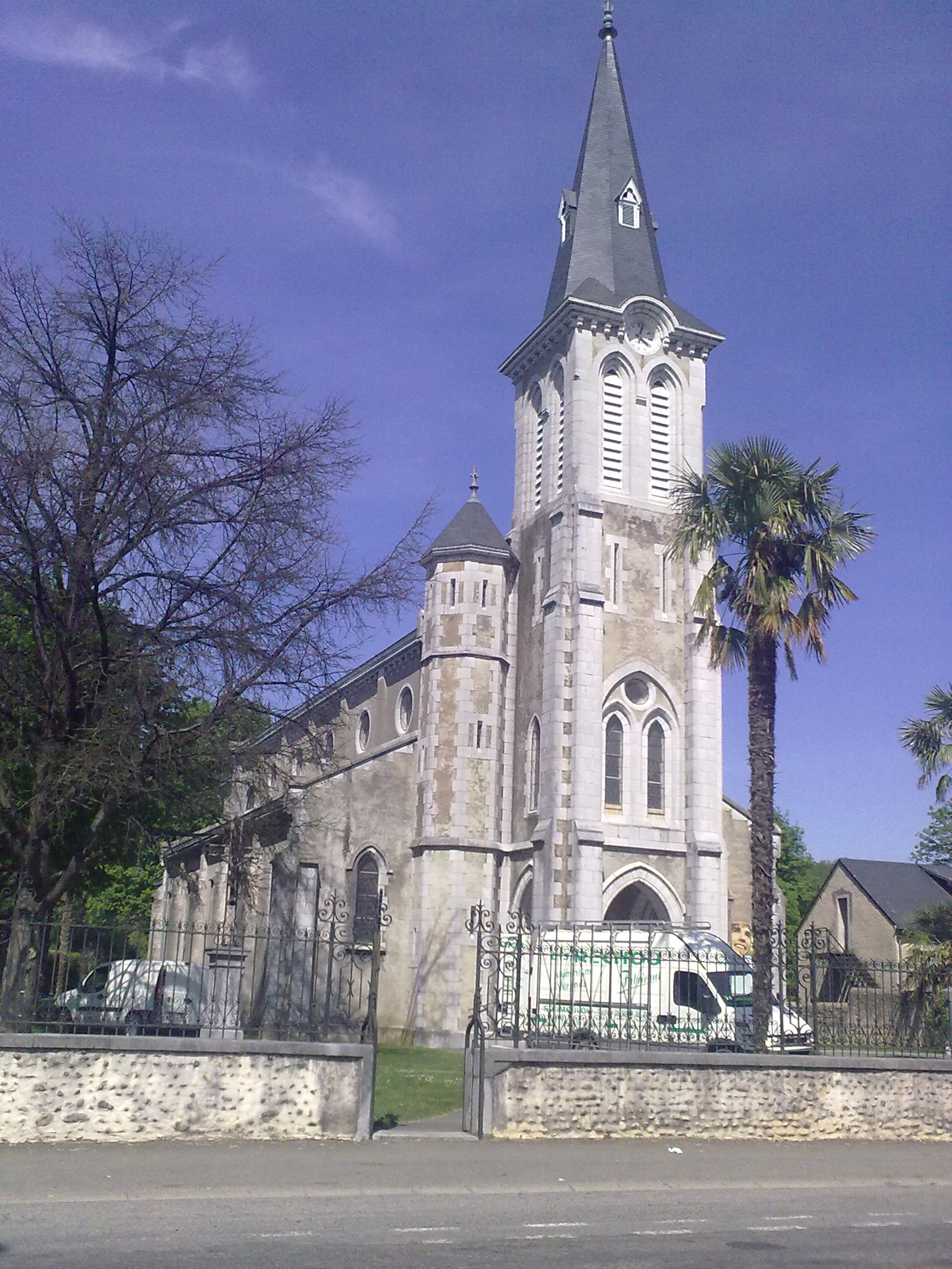 Soumoulou, France